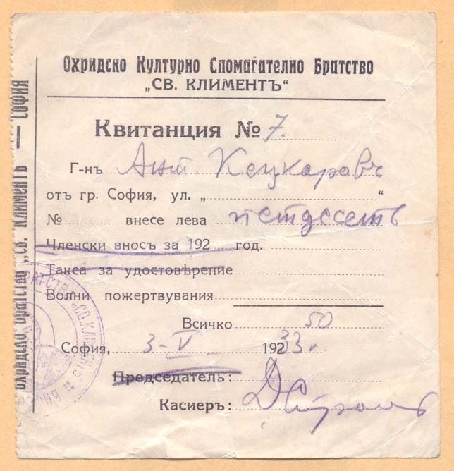 Разписка на Охридското братство на Антон Кецкаров